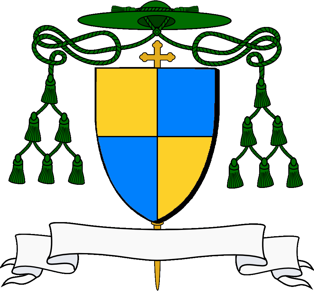 Palefarzhet etre aour ha glazur